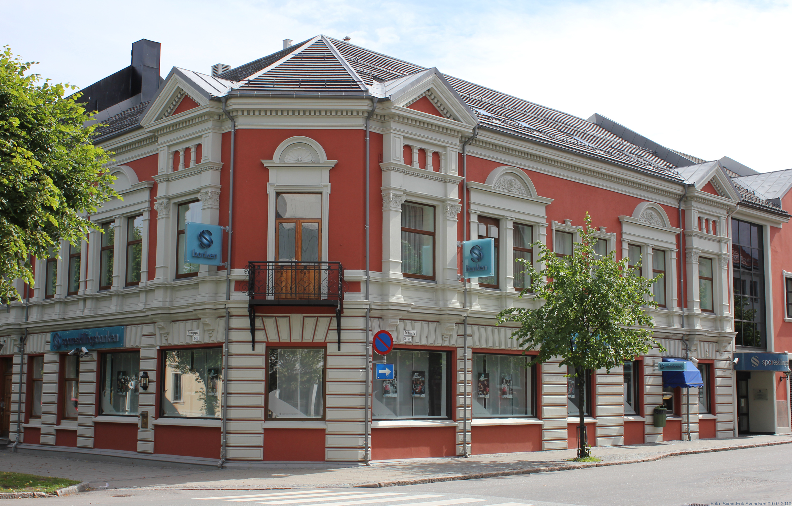 Spareskillingsbankens kontor i Festningsgata 11, Kristiansand, Vest-Agder, Norge.